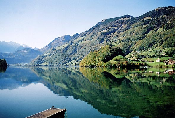 Lungerersee: Blick von Kaiserstuhl auf den Lungernsee